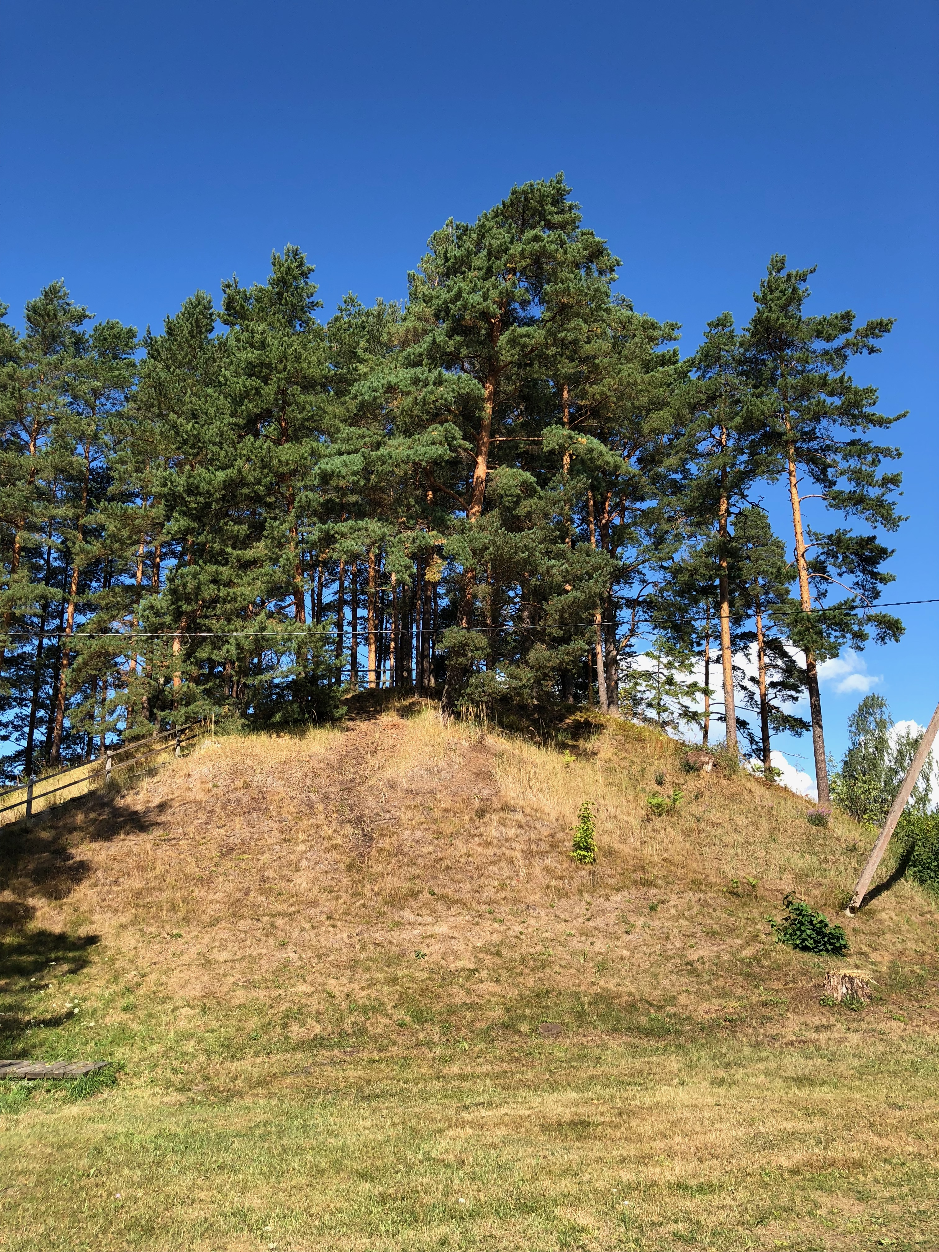 Пярнумаа